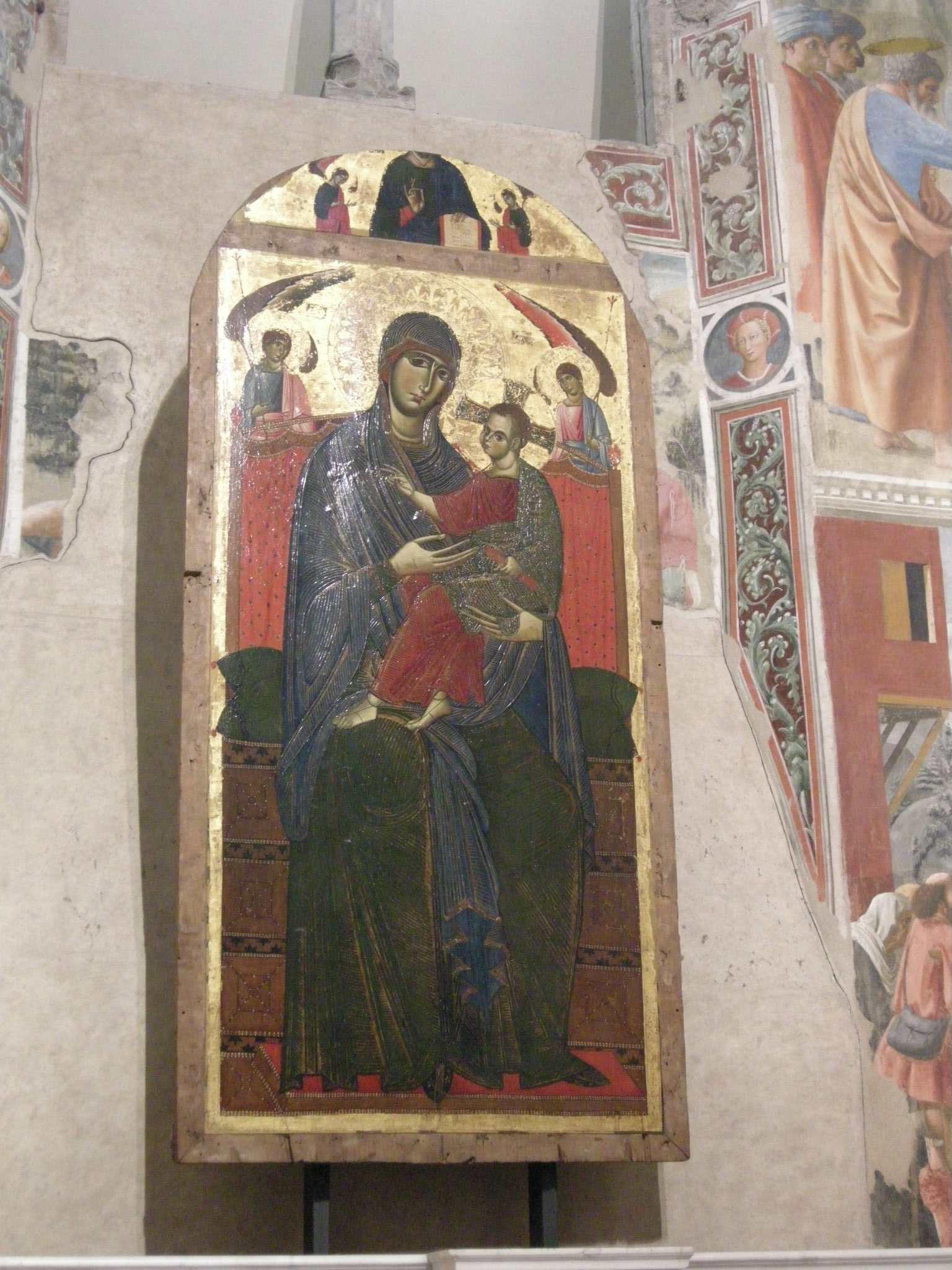 Cappella brancacci, madonna del popolo